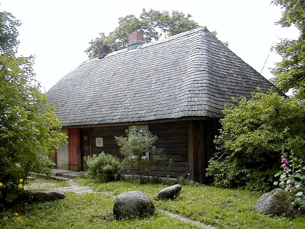 Kaikaši - A. Austriņa muzejs Vecpiebalgā. 2001-08-25